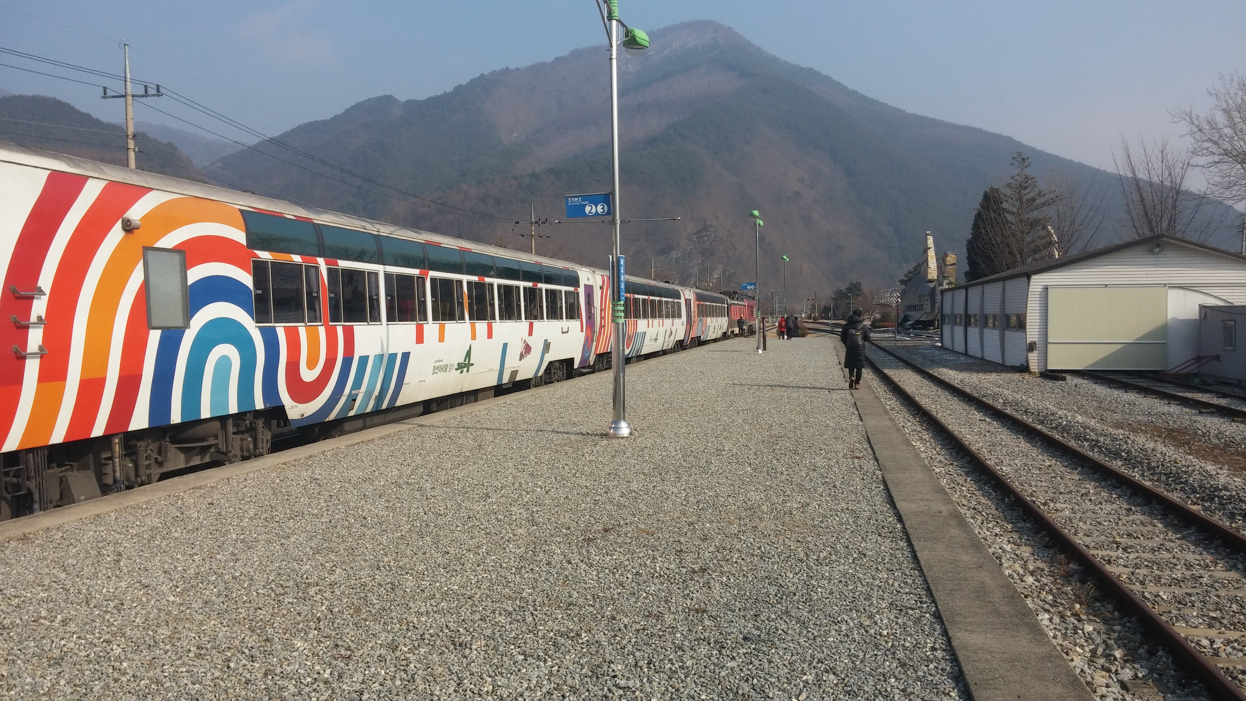 한국철도공사 아우라지역 승강장.